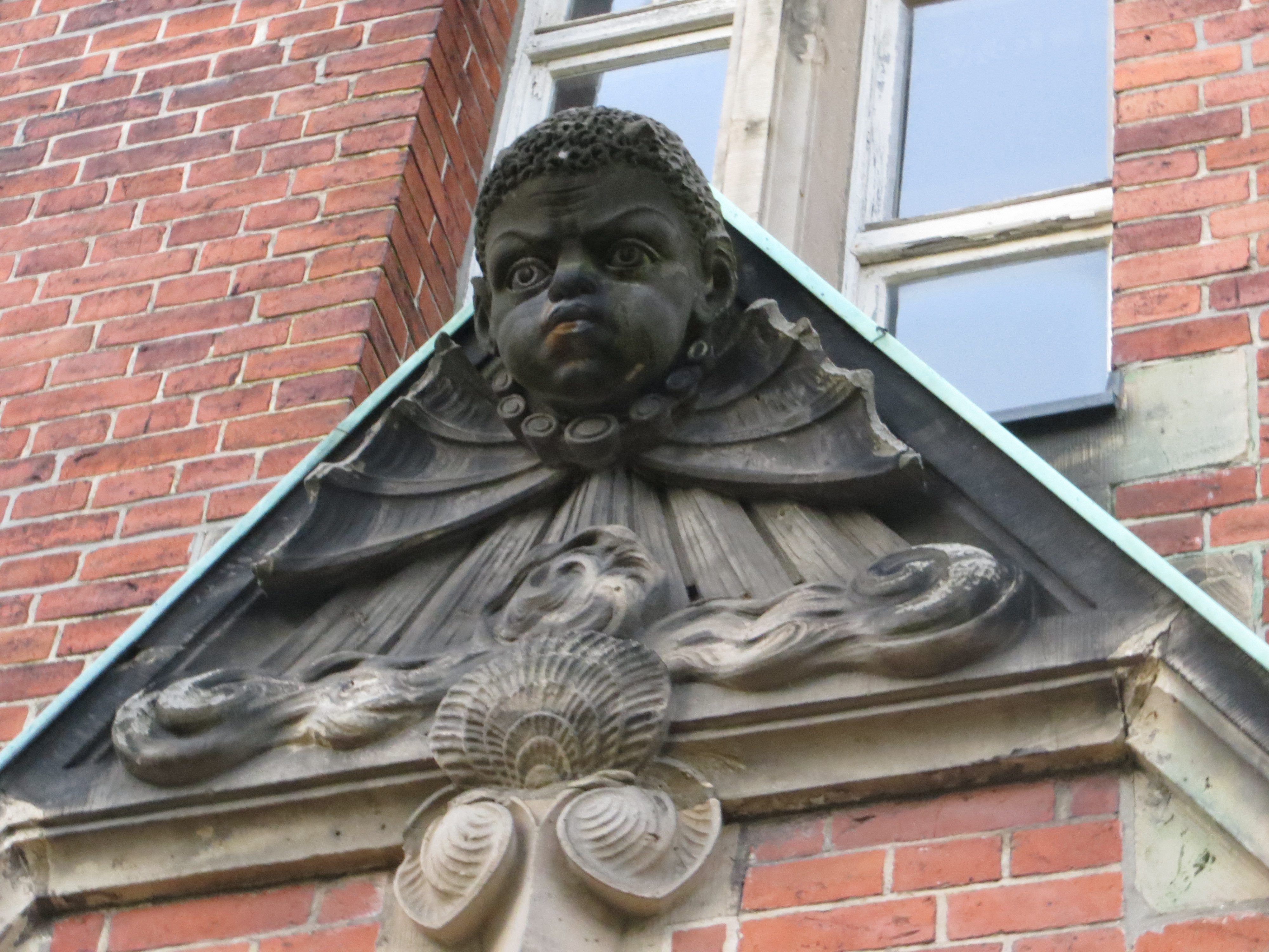 Knabengesicht an der Fassade des Alten Museums (Museumsberg, Flensburg)